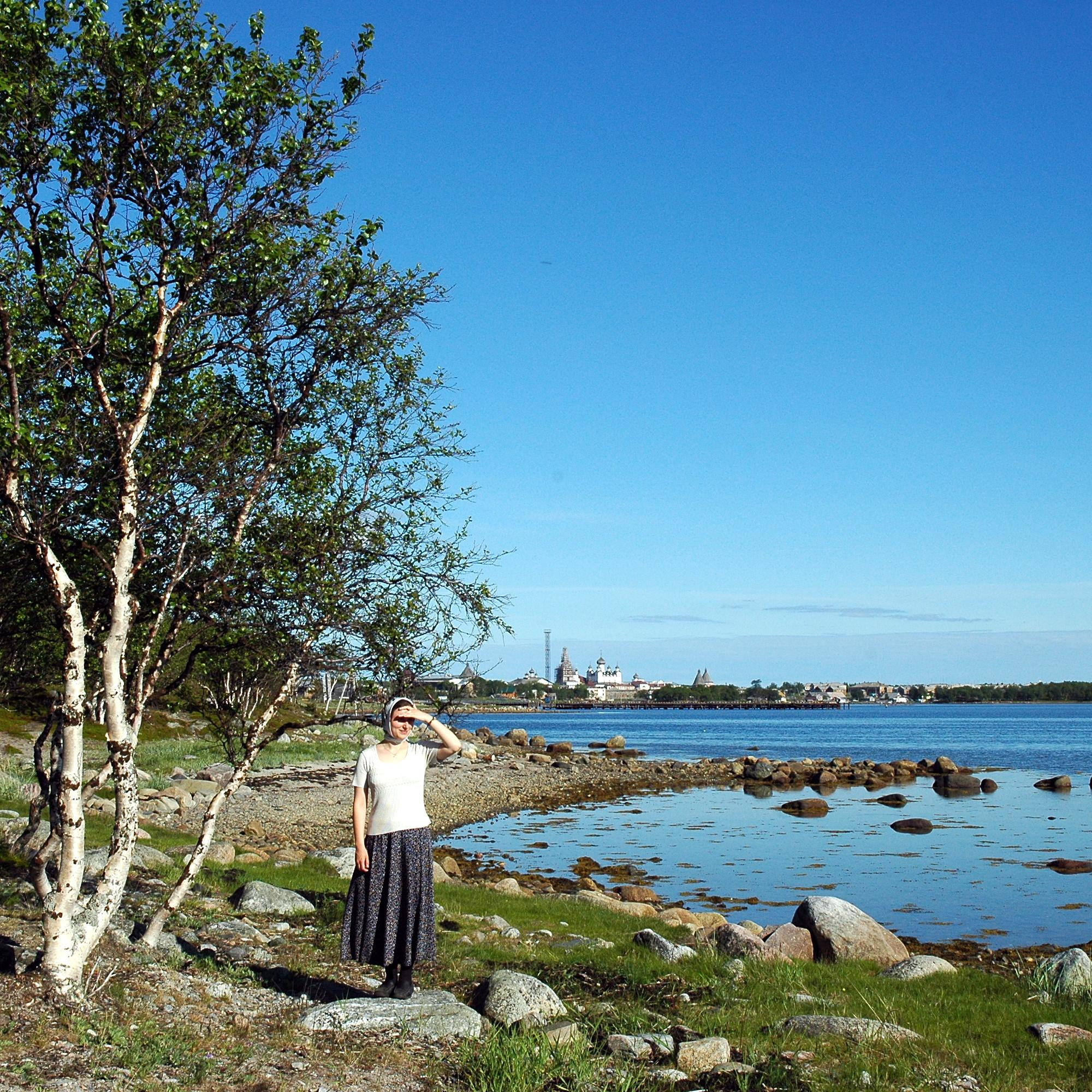 Соловки. Июнь 2005 года.